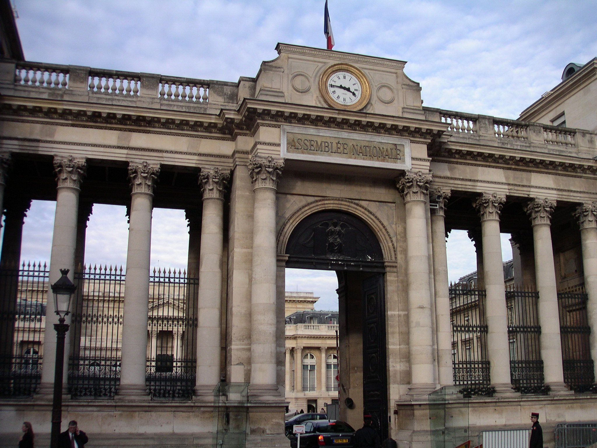 Assemblée Nationale